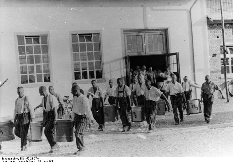 Dachau, Konzentrationslager Schutzhaftlager Dachau.- Häftlinge Töpfe tragend.